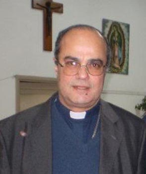 Fernando María Bargalló, obispo emérito de la Diócesis Merlo Moreno entre 1998 y 2012.